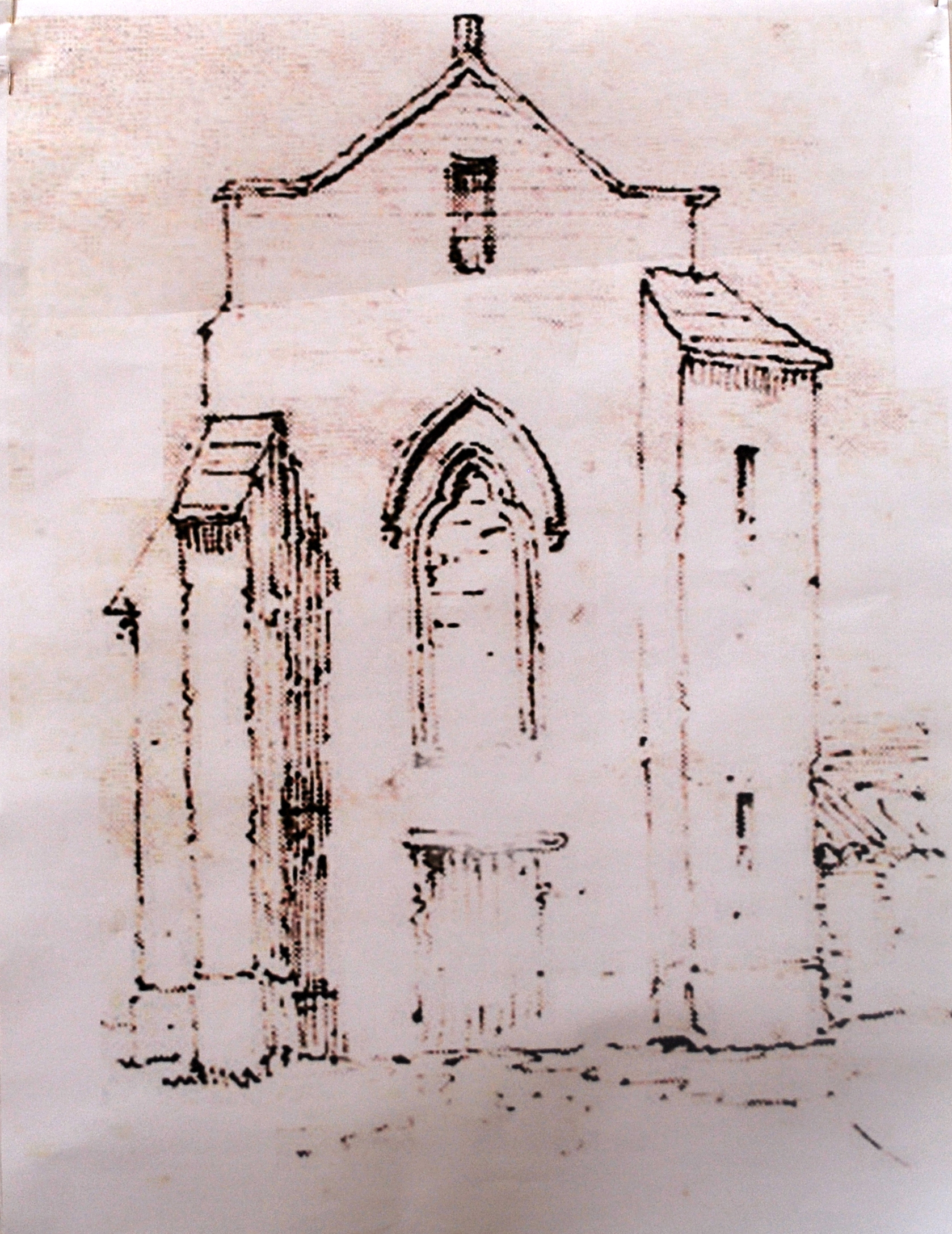 Saint-Loubès chapelle Saint-Loup Façade Est(Drouyn c 1855)